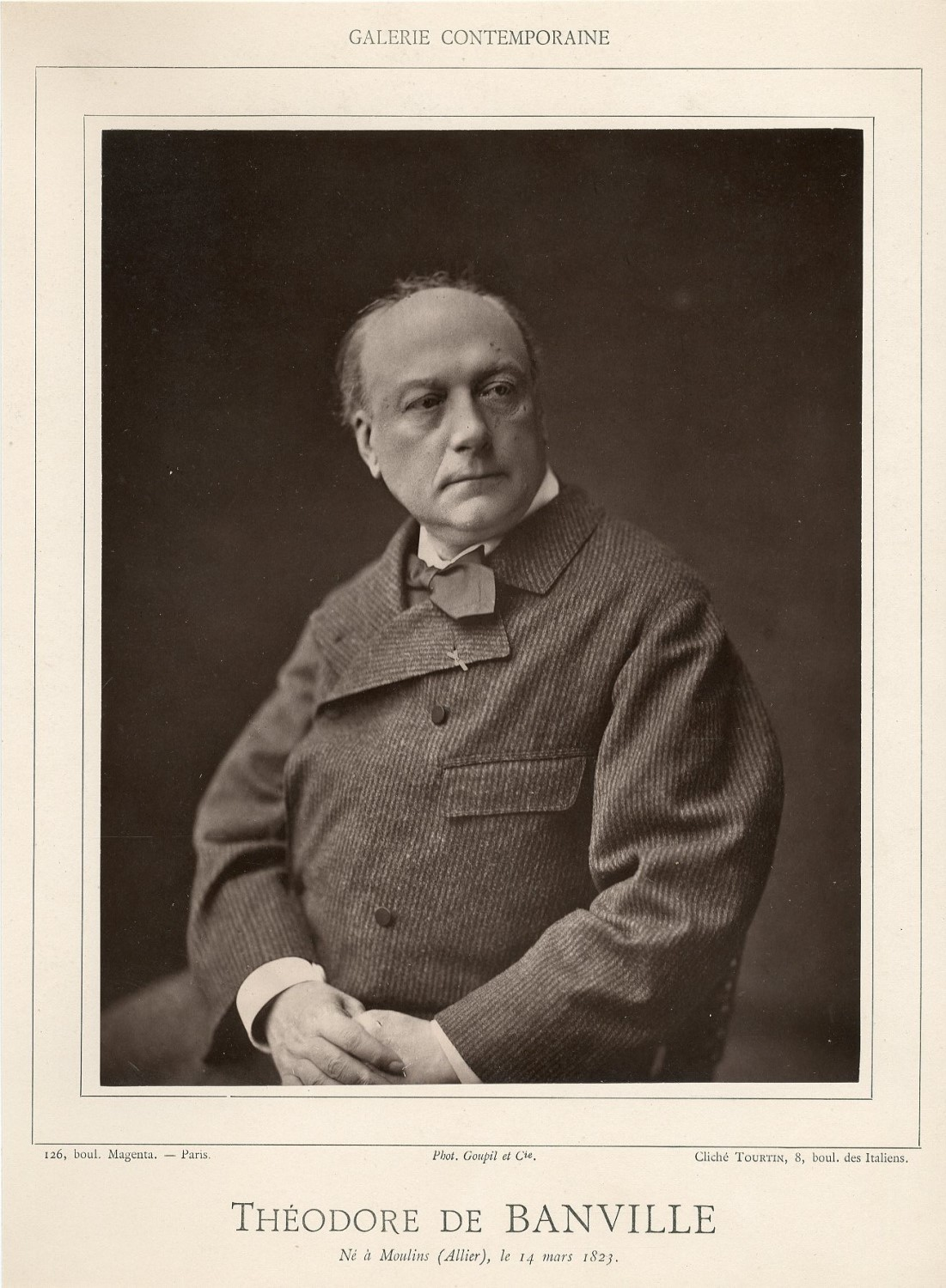 Portrait photographique de Théodore de Banville, poète français (1823-1891). Photographe Goupil [et] C°. Ce portrait a été publié dans la revue illustrée Galerie contemporaine, littéraire, artistique qui faisait partie d'une série publiée par Goupil & Cie. Parue entre 1876 et 1884, la série comprend 241 portraits de personnalités dans les domaines de l'art visuel, de la littérature, de la musique, de la science et de la politique. Les portraits, de photographes parisiens, étaient imprimés par photoglyptie, procédé opto-mécanique qui dégagait les parties claires des parties sombres, grâce à une gradation de tons continus. Sa vitesse et son faible prix, ainsi que la longévité des reproductions (les procédés concurrents produisaient des copies dont le contraste diminuait avec le temps), en ont fait un procédé prisé pour l'impression en grande quantité.